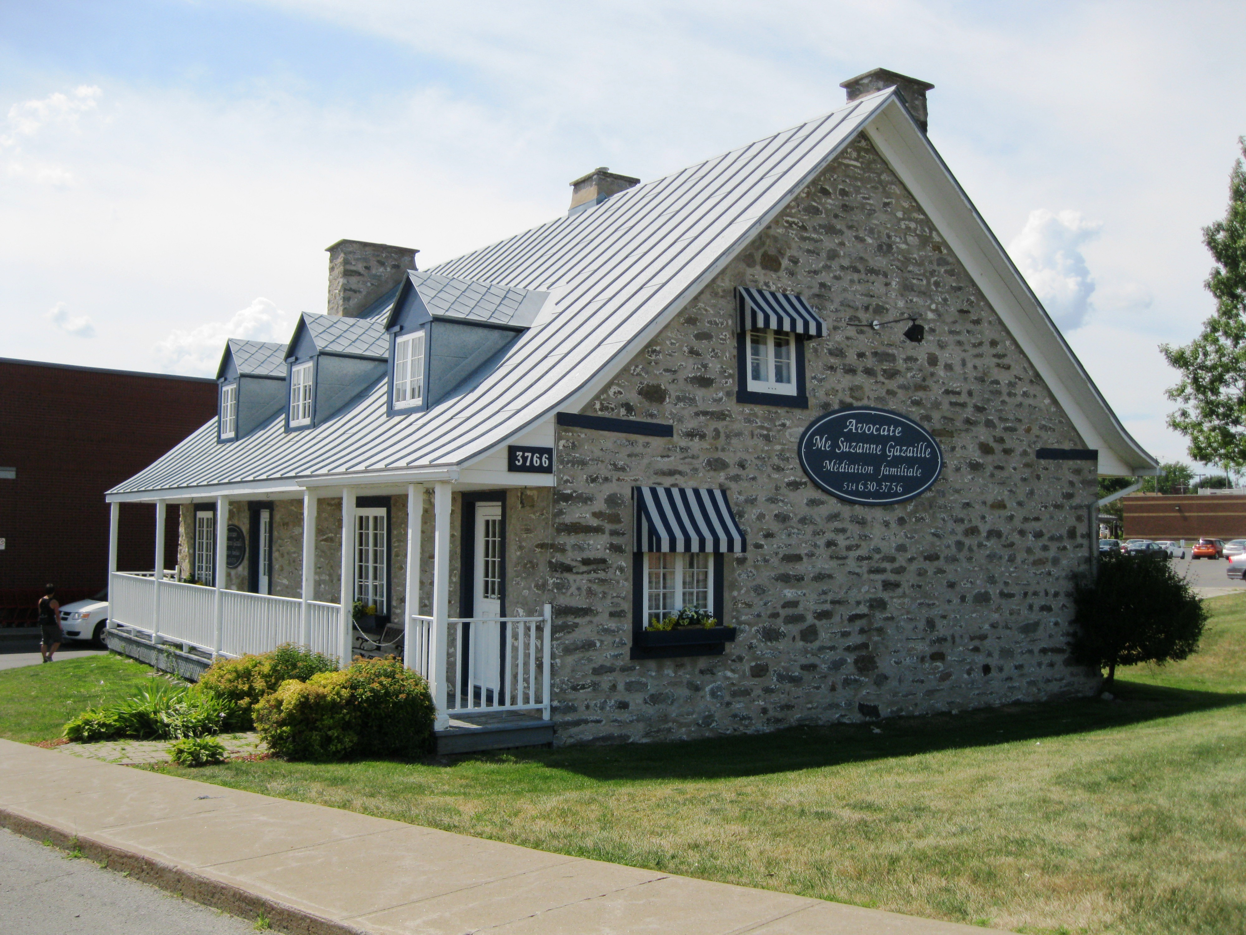 Maison Jean-Baptiste-Jamme-Dit-Carrière, 3766, boulevard Saint-Charles, Kirkland, Québec